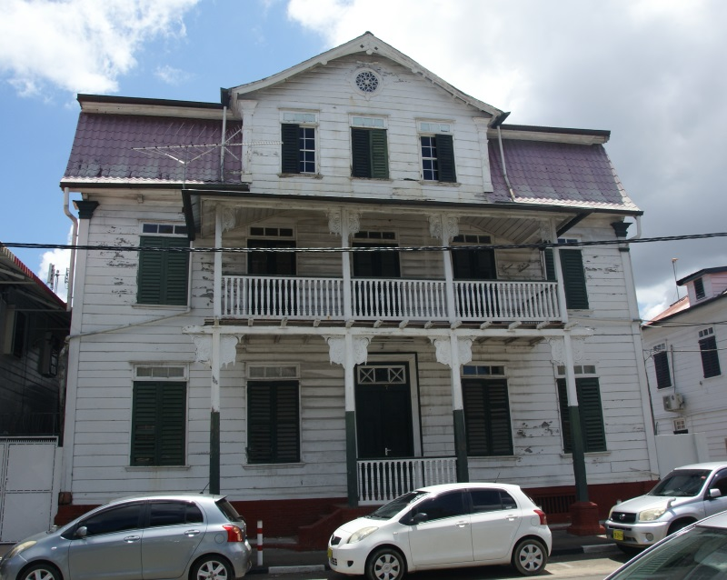 Wagenwegstraat 47, Paramaribo, Suriname